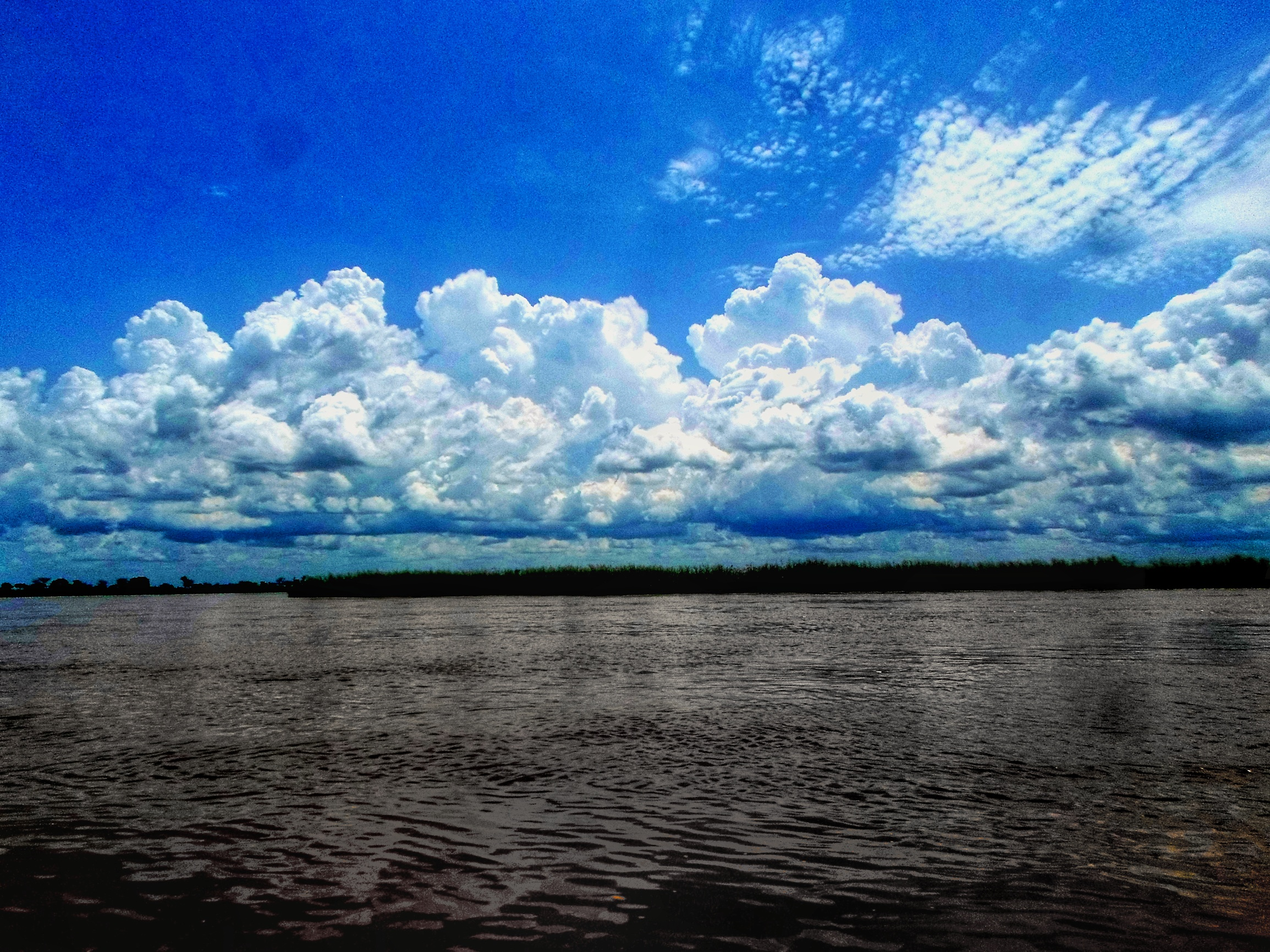 Le fleuve logone. Zebe frontière entre cameroun et tchad.